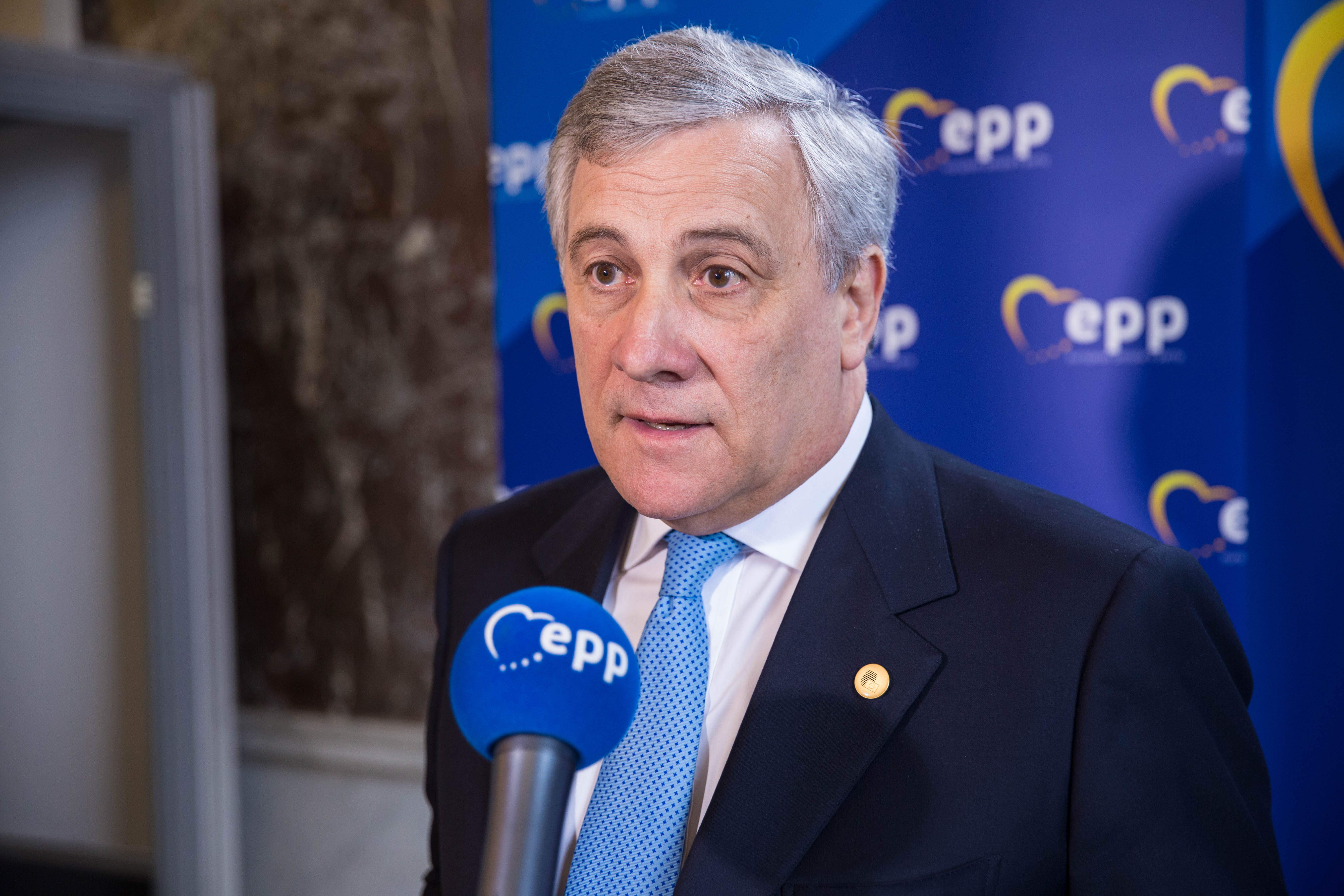 EPP Summit, Brussels, March 2017